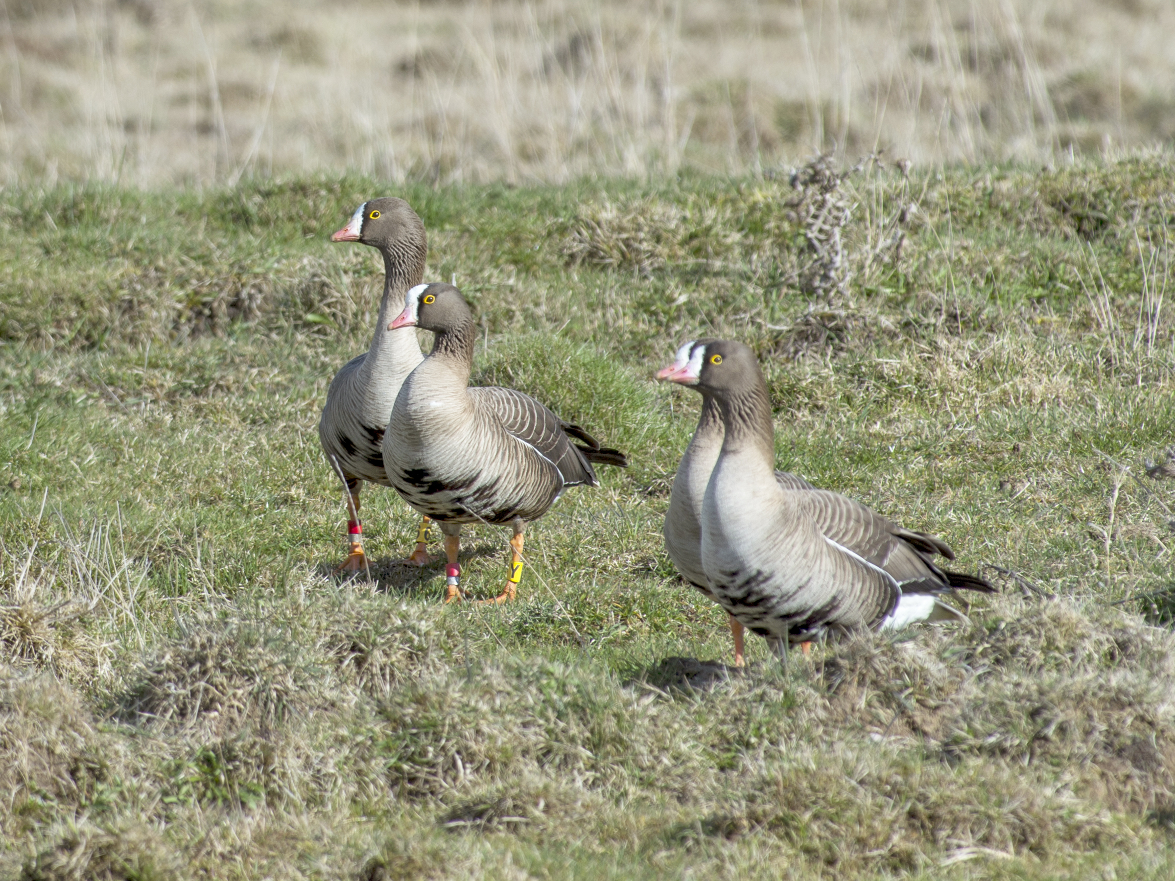 Lesser White-fronted Goose Anser erythropus, Sätunaviken, Östergötland, Sweden